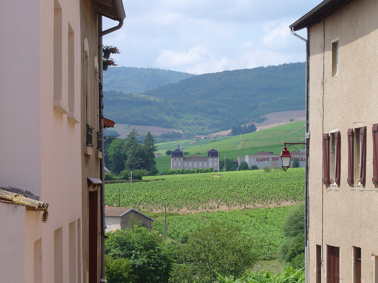 Juliénas, Frankreich: Château und Weinkellerei der Cooperative vom Marktplatz aus gesehen. Fotografiert von User:Ile-de-re am 28.06.2006